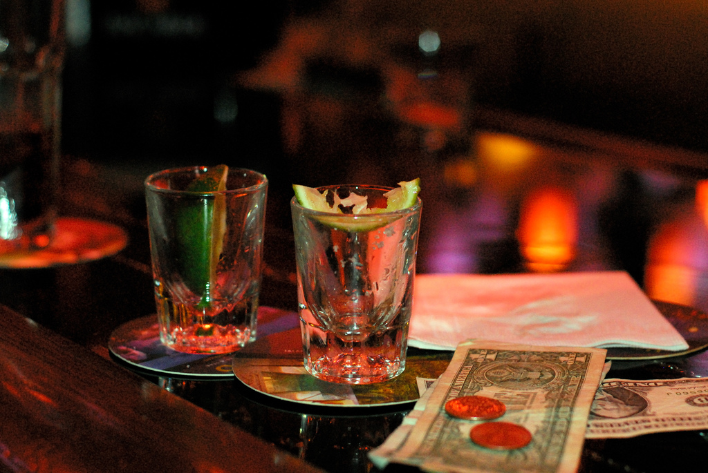 En Estados Unidos casi todo es más grande, incluso los chupitos, que son como el doble o el triple de los de España (y también mucho más caros).